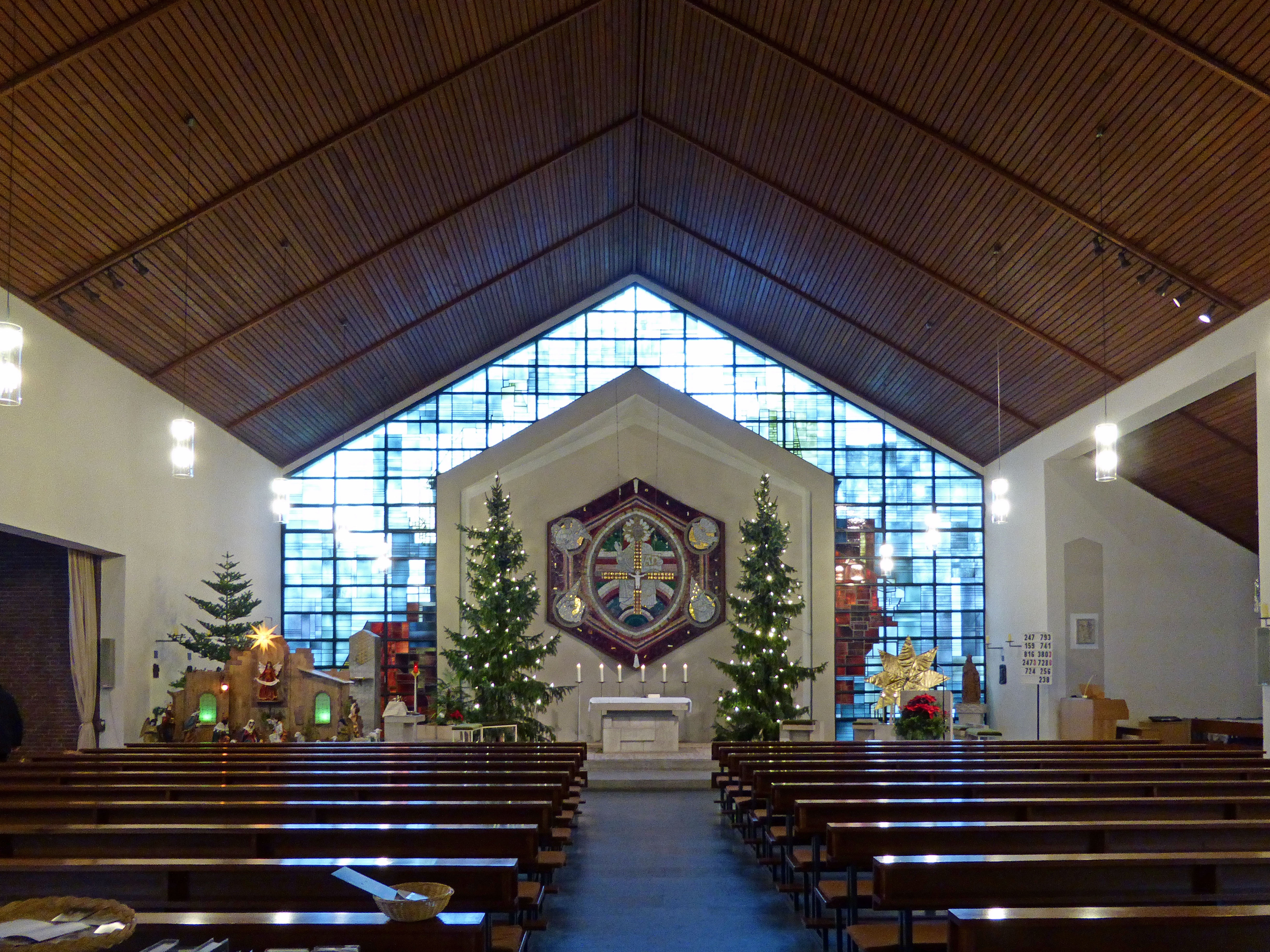 Katholische Kirchen in Königslutter.